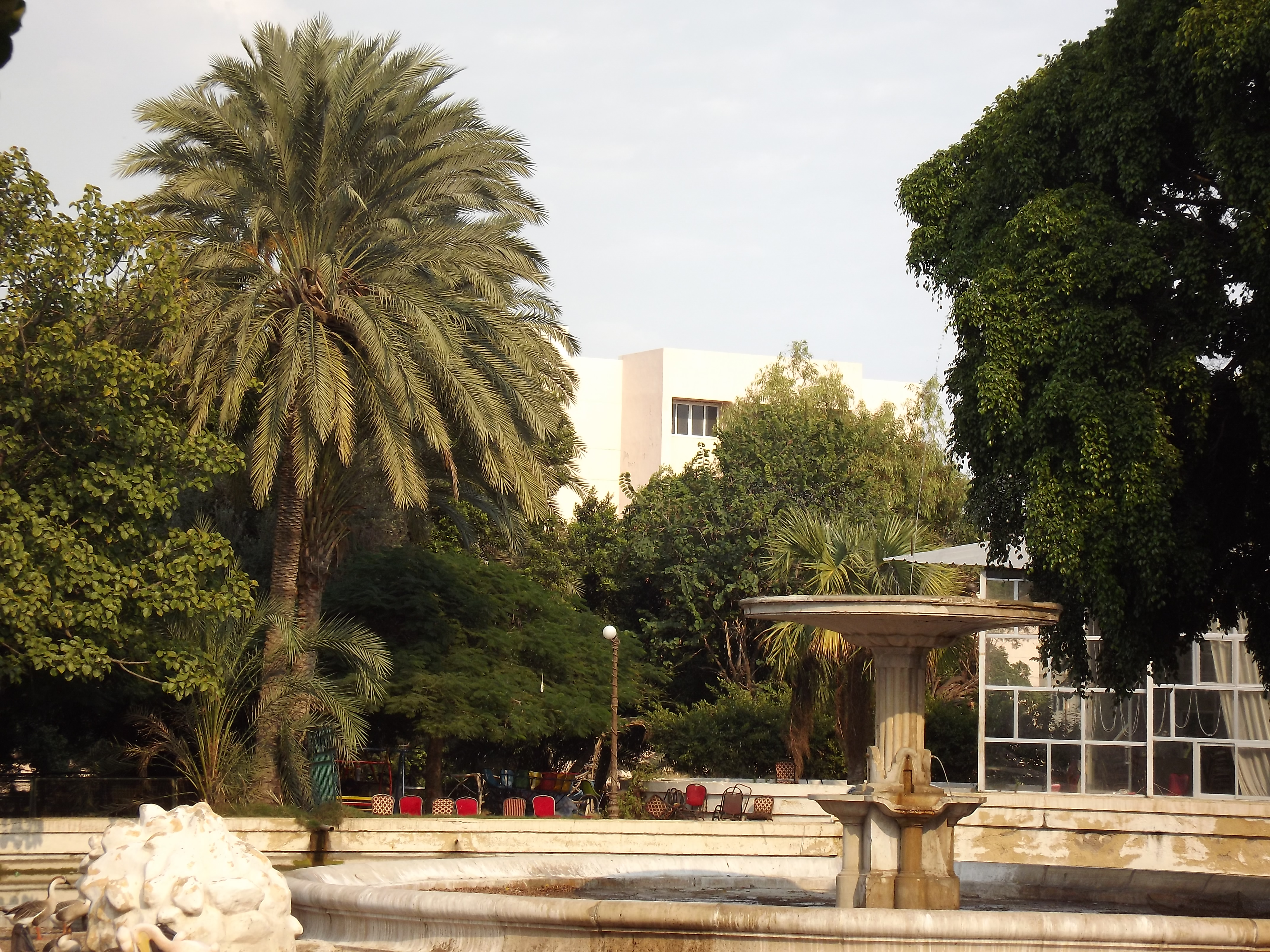 حديقة حيوان النزهة - الاسكندرية